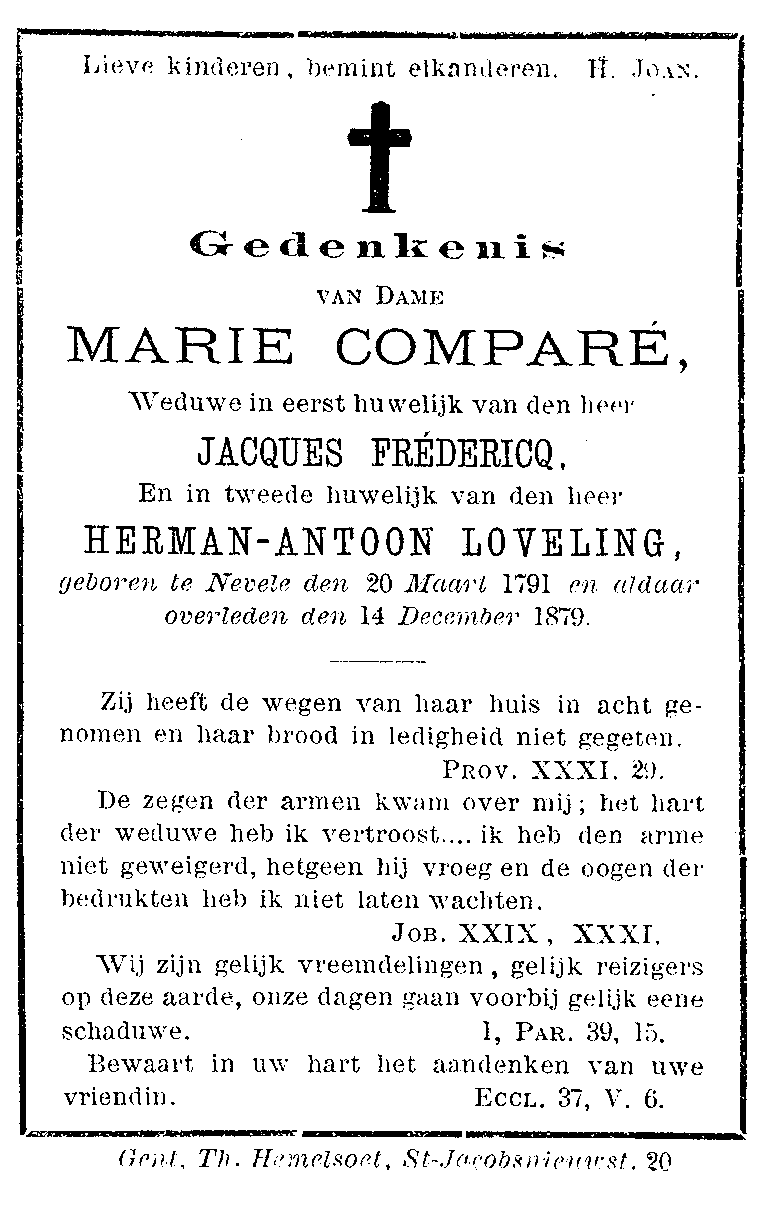 Bidprentje uit 1879 van de grootmoeder van Cyriel Buysse.